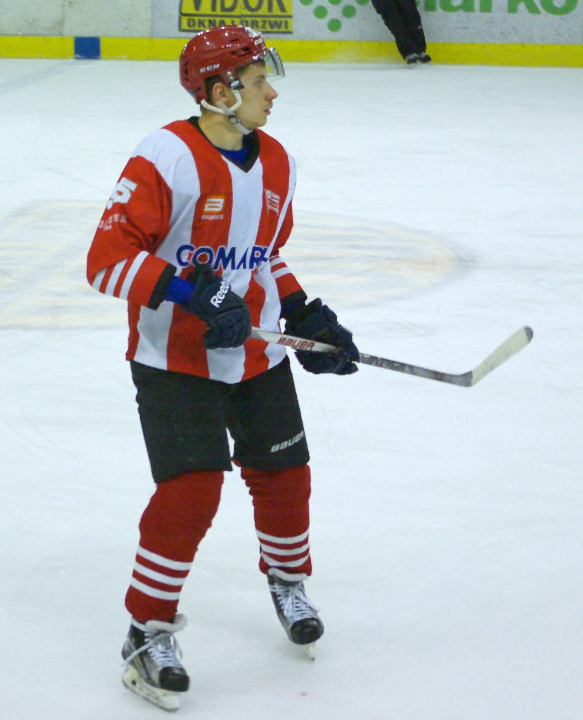 Damian Kapica w barwach Cracovii w meczu przeciw STS Sanok (Arena Sanok, 17 stycznia 2016)